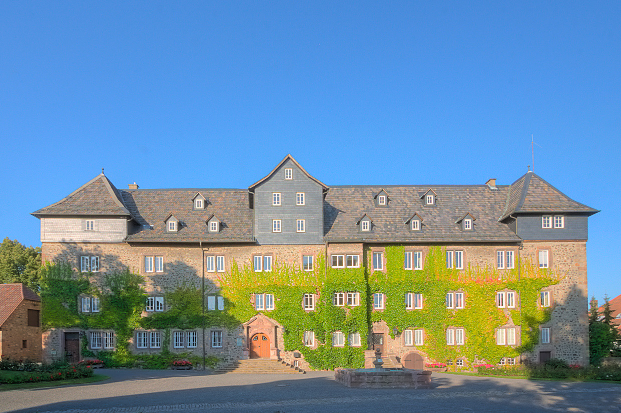 Die Anfänge des Lauterbacher Schlosses gehen auf das Jahr 1266 zurück. In der Urkunde über die Erhebung Lauterbachs zur Stadt wird ein „propugnaculum vel turrim“, ein „Bollwerk“ oder „Befestigungsturm“ erwähnt. Die Burg mit ihren Mauern und umgebenden Gebäuden verstärken die westliche Flanke der Stadtbefestigung. In der Burg befindet sich heute die Verwaltung der Freiherren Riedesel zu Eisenbach und das riedeselsche Archiv.